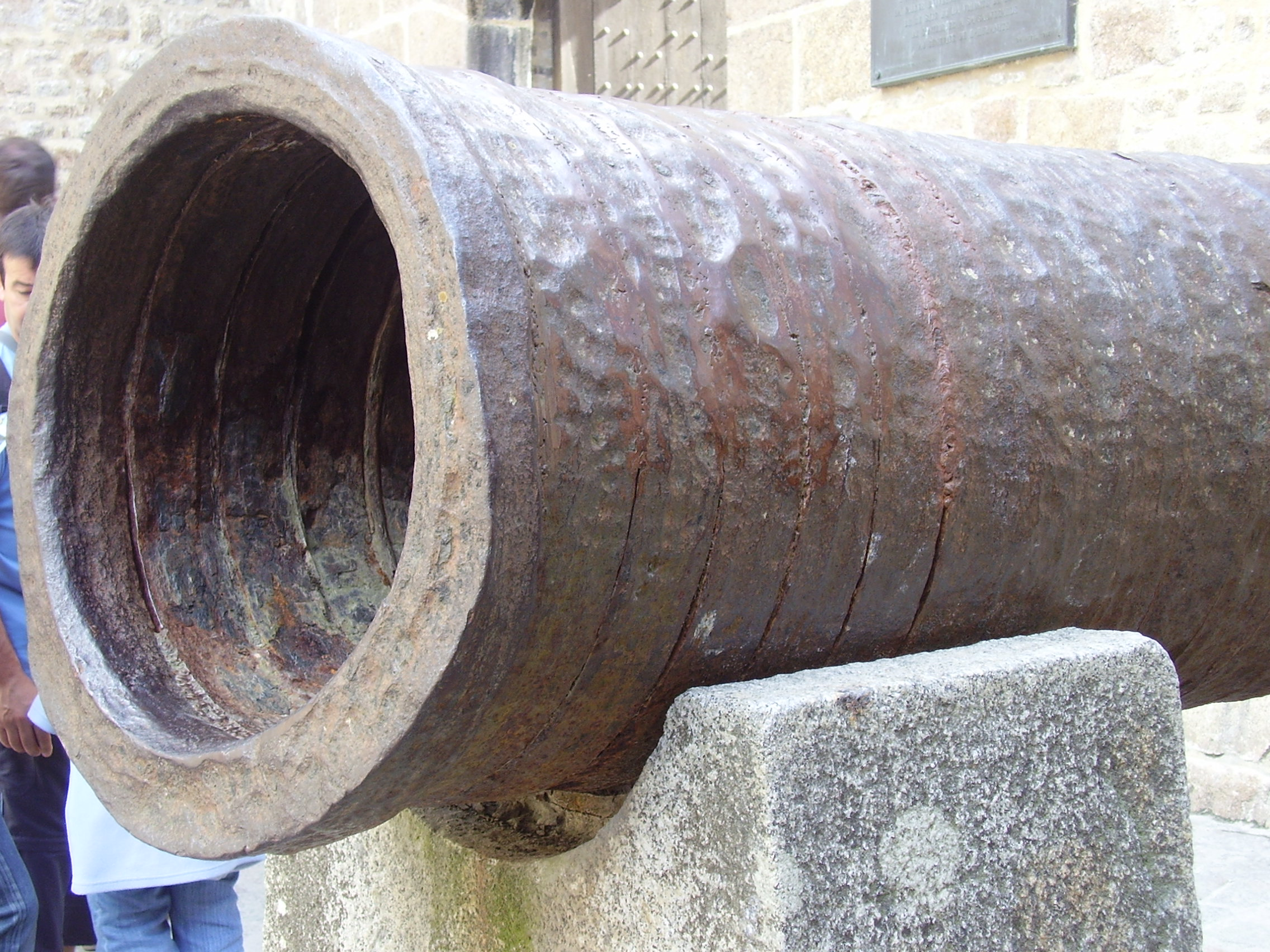 Mont Saint-Michel; Frankreich; Stabringgeschütz; Im Regelfall war es bis 1400 so, das Geschütze um einen Kern geschmiedet wurden. Meist dreilagig: Innen Metallbleche, dann Längsstäbe und außen herum Ringe (wie bei einem Faß). Es wurde allerdings sehr viel probiert, so dass es durchaus möglich ist, dass sich auch mal jemand daran versucht hat ein Geschützrohr zu wickeln. Möglicherweise wurde hier das Innenrohr bereits entfernt. Eine der zwei Hauptbüchsen (Bild Gesamtseitenansicht) welche von den Engländern auf die Insel Mont-Saint-Michel gebracht wurden und nach deren Flucht im Jahre 1434 [1] zurückgelassen wurden.